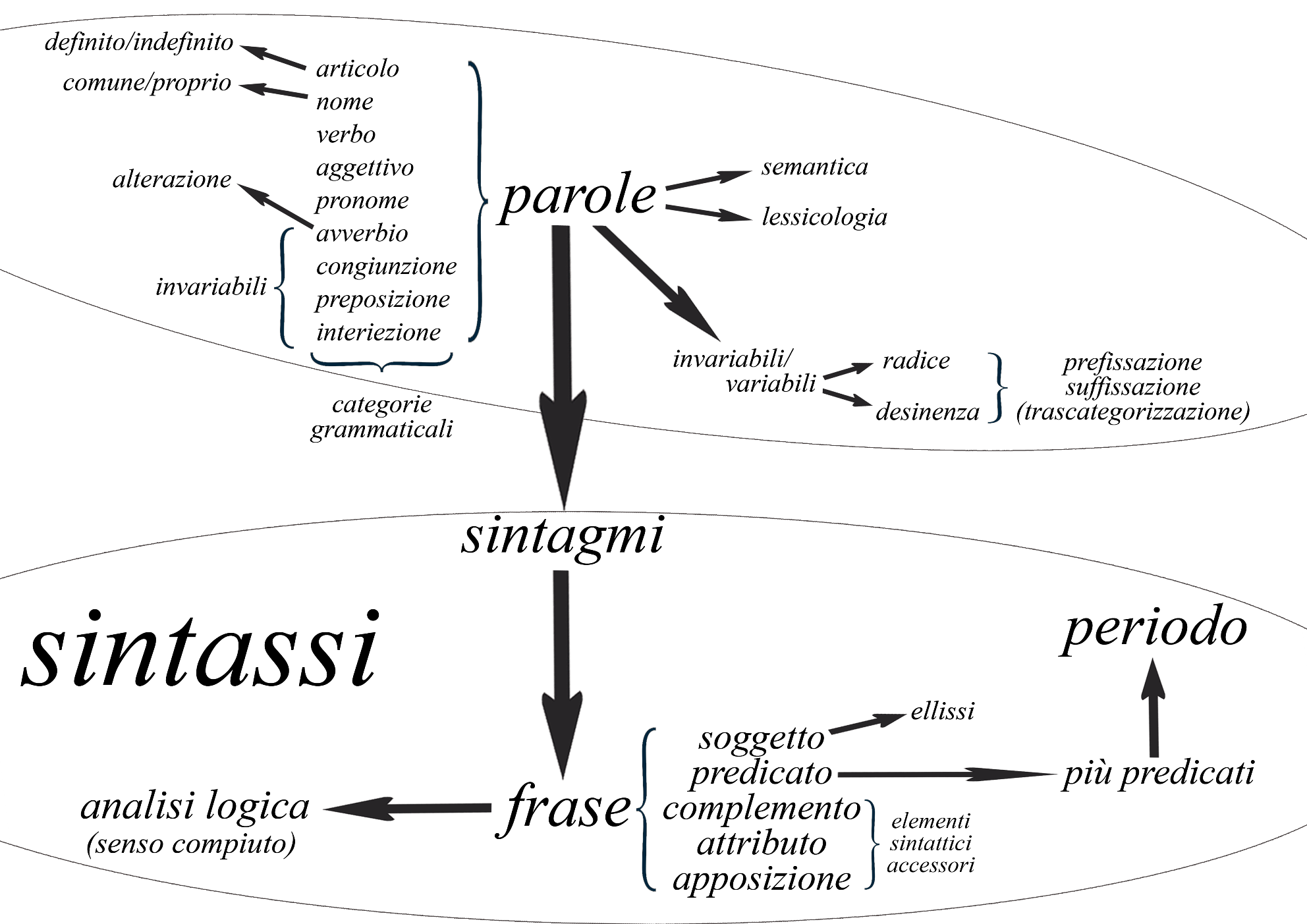 Schema sinottico delle parti del discorso (o categorie grammaticali) e degli elementi fondamentali della sintassi per la lingua italiana [fonte: rielaborazione e schematizzazione del capitolo secondo ("Analisi logica e analisi grammaticale") della "Grammatica italiana" di Luca Serianni, ed. UTET-De Agostini, 2010, ISBN 978-88-6008-057-8]